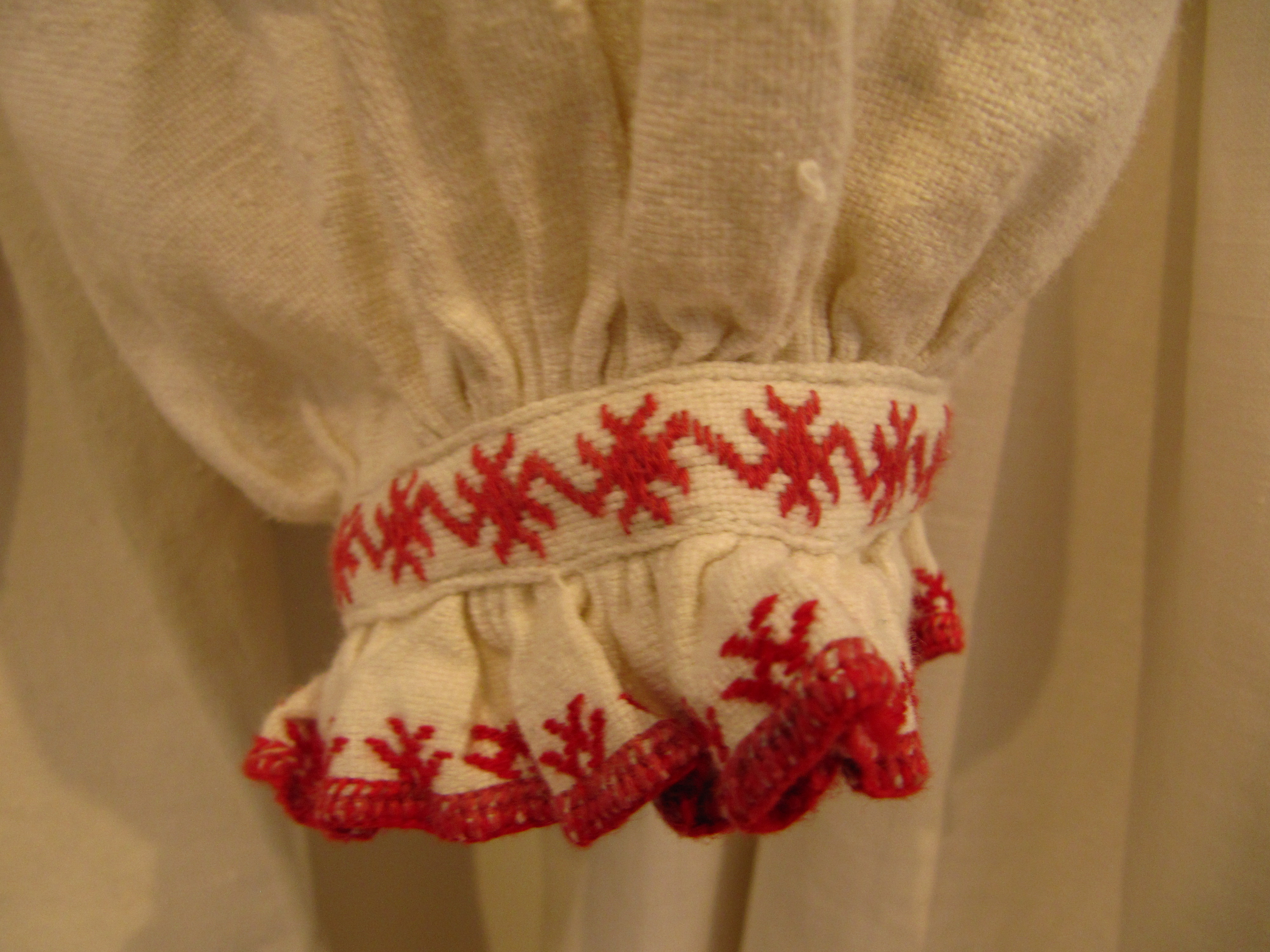 Жіноча сорочка до підточки. 1 половина 20 ст. Вінницька обл. Крижопільський р. с. Шарапанівка. Виставка в музеї Івана Гончара (Київ).